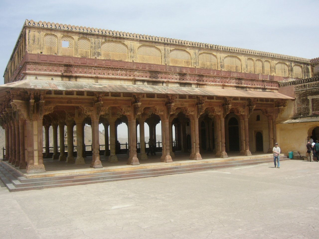 Amber Fort Jaipur Rajasthan India